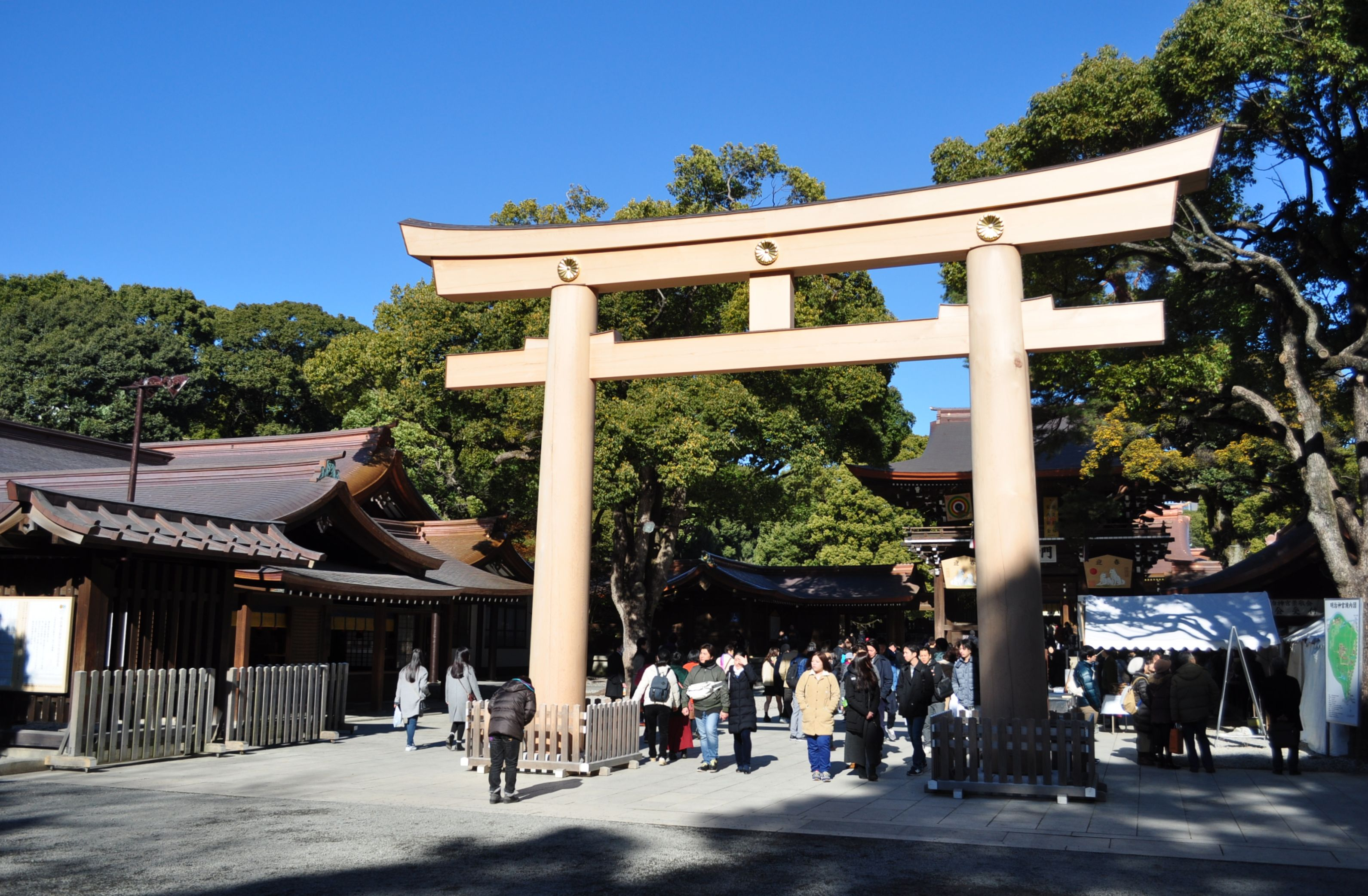 明治神宮 三の鳥居